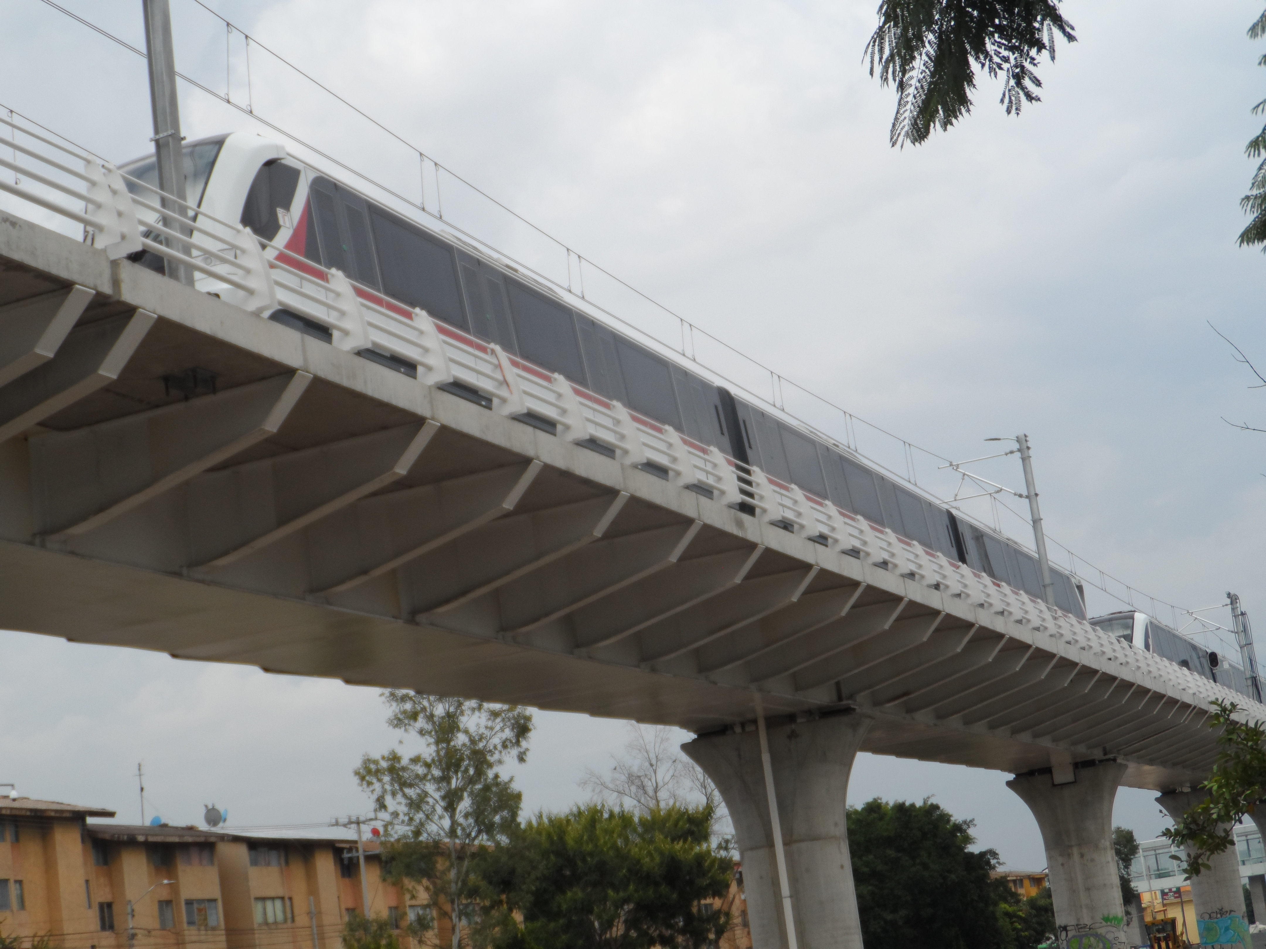 El estacionamiento norte de la Línea 3 del Tren Ligero de Guadalajara, junto a la estación Arco del Triunfo o Periférico Tesistán. Se ven dos trenes Metrópolis 9000 estacionados en dicho estacionamiento.